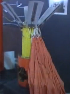 Pétalos de frenado del Canopus II